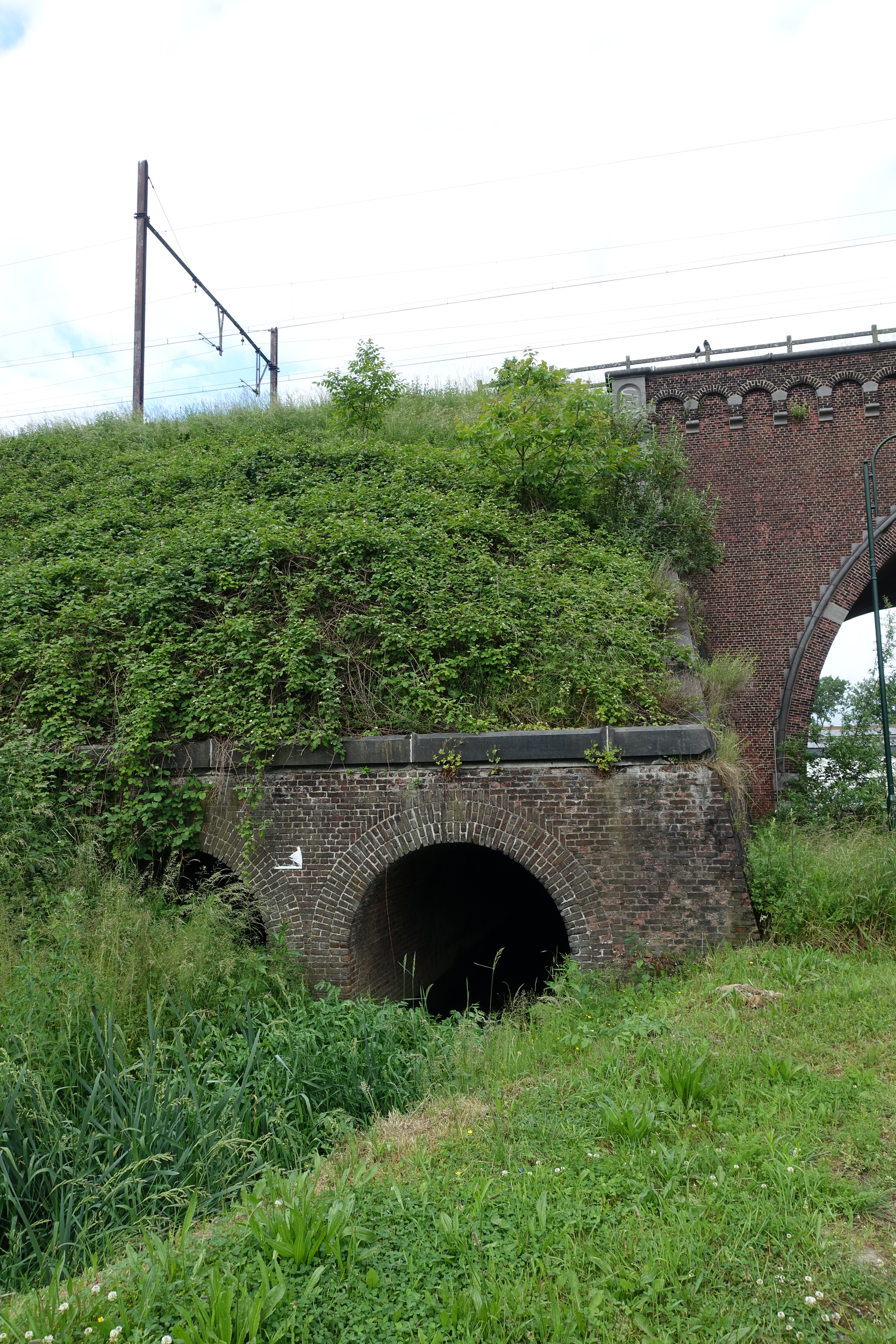 Duiker van de Hollebeek in de spoorwegberm van spoorlijn 26 nabij de Verdunstraat ten noorden van Haren